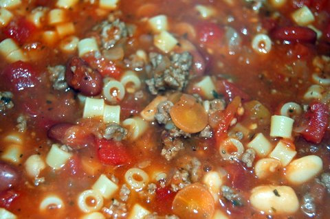 Pasta e fagioli soup